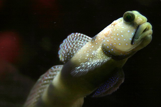 Watchman Gobi